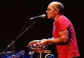 Músico brasileiro Marcos Suzano em imagem do acervo da TV Brasil.